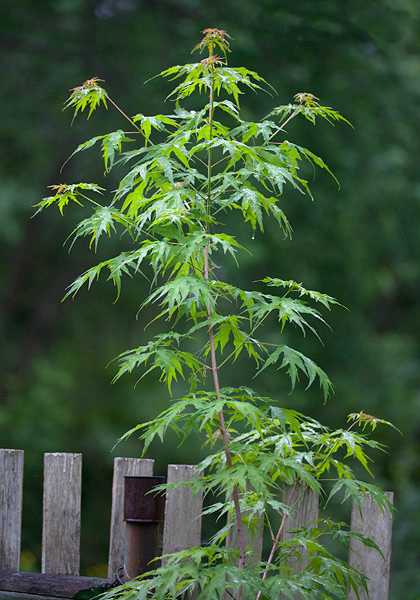 молодое растение